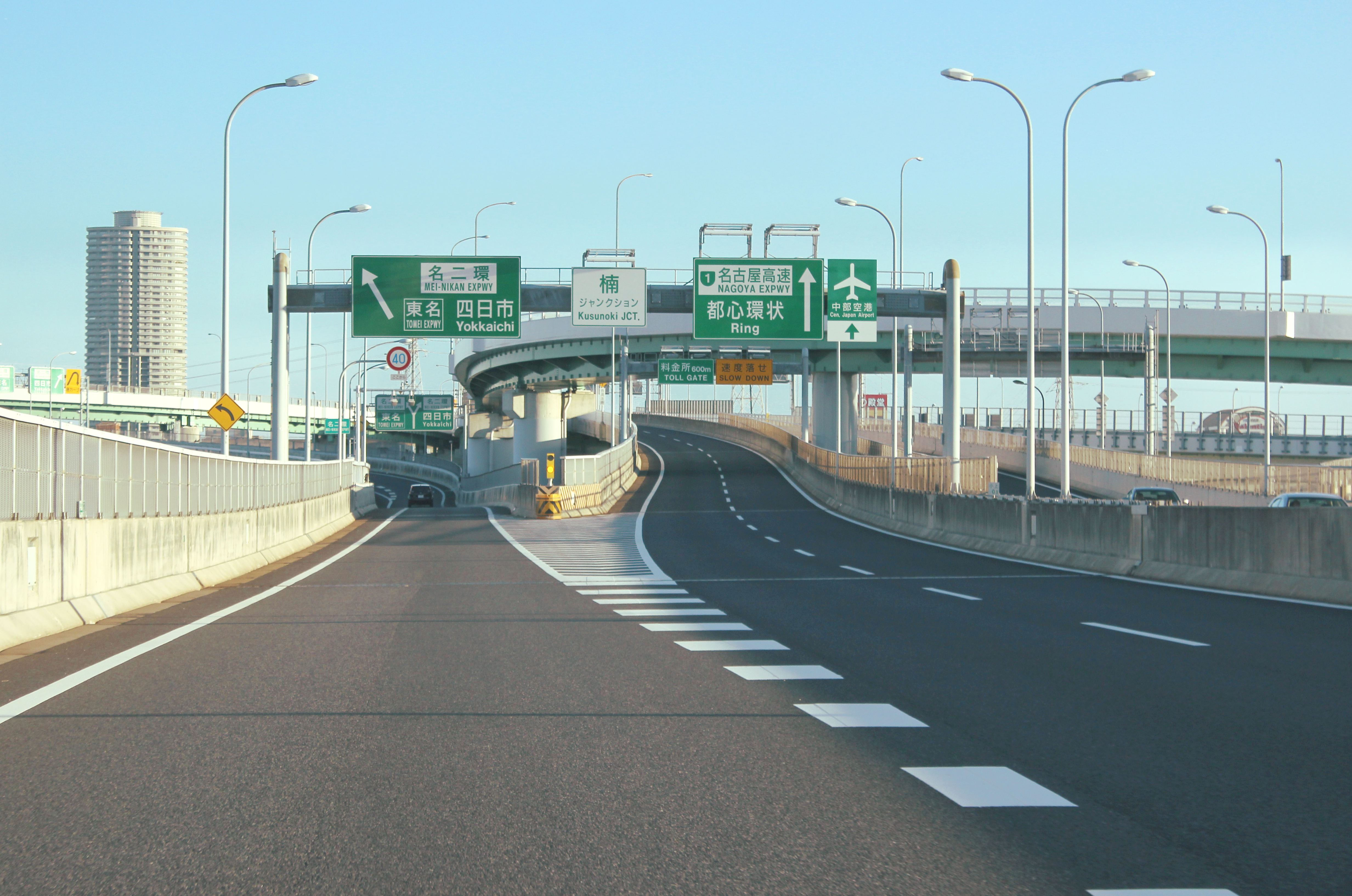 楠ジャンクション 11号小牧線から都心環状線・名二環方面行き